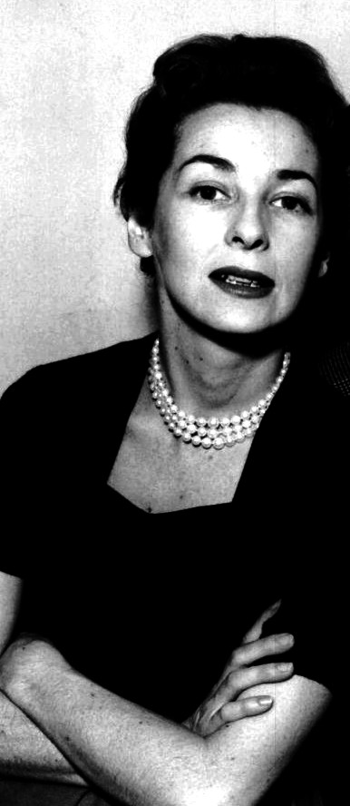 Felicia Mongealegre en 1955